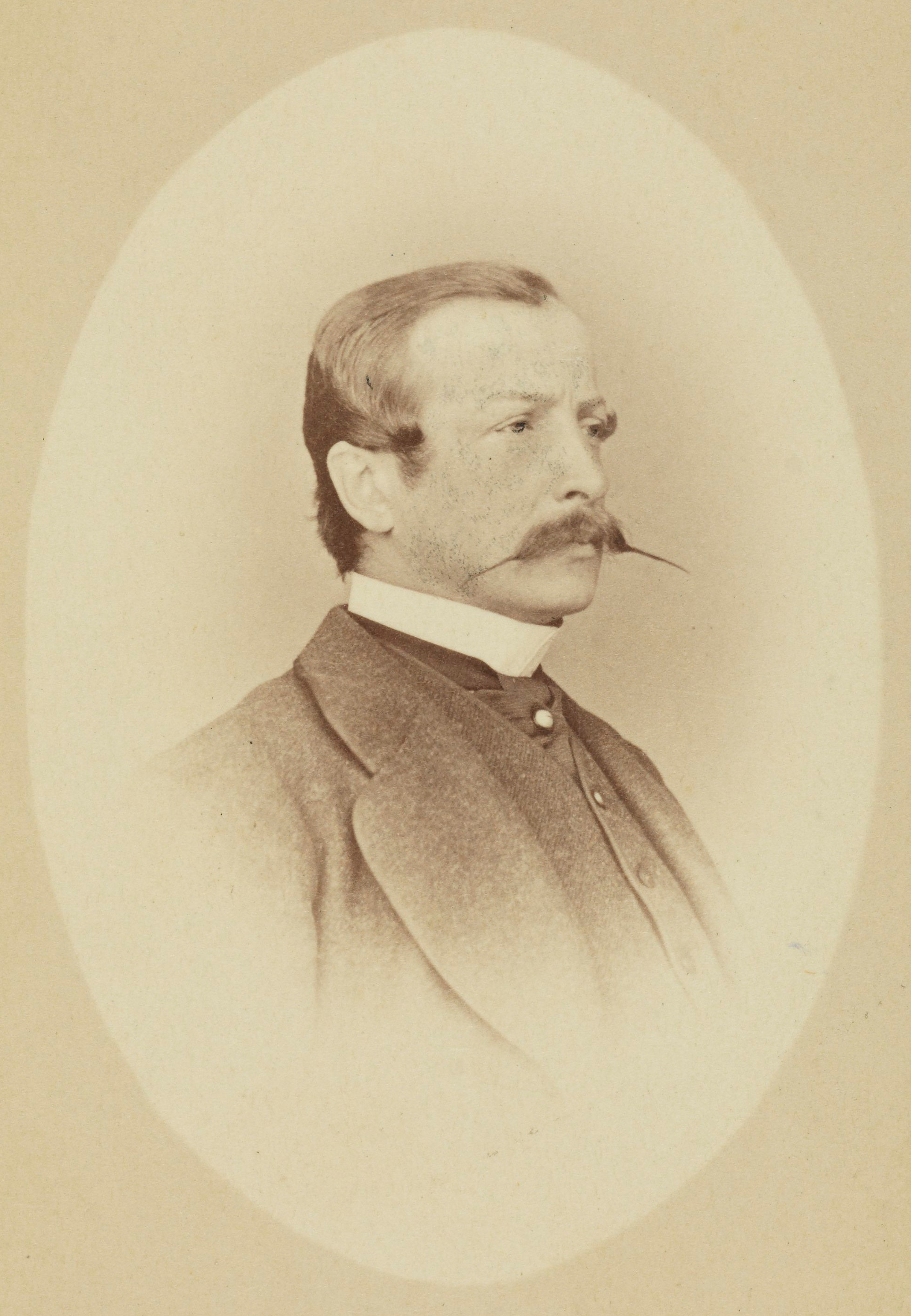 Edward Domaniewski